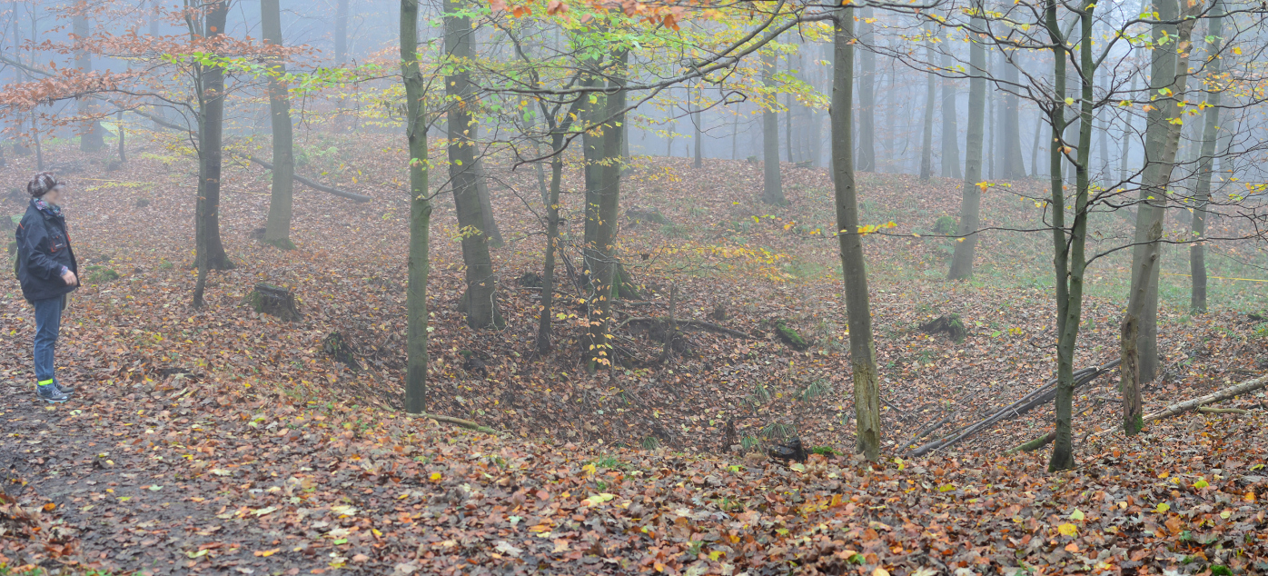 Vertiefung in der Heisterburg, vermutlich Zisterne, dahinter der Wall